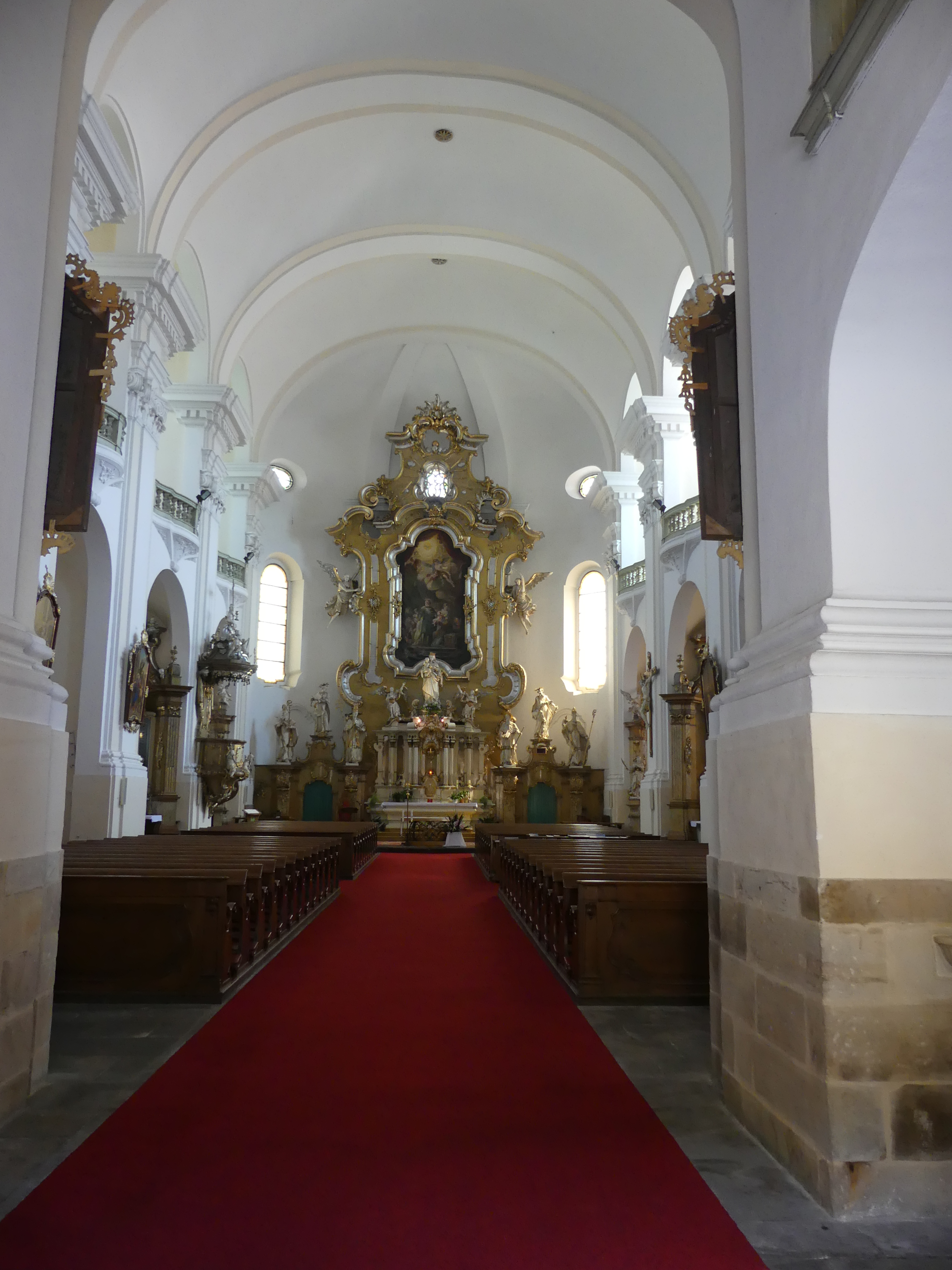 Kostel Narození Panny Marie, Školní, Vnitřní Město (Trutnov).